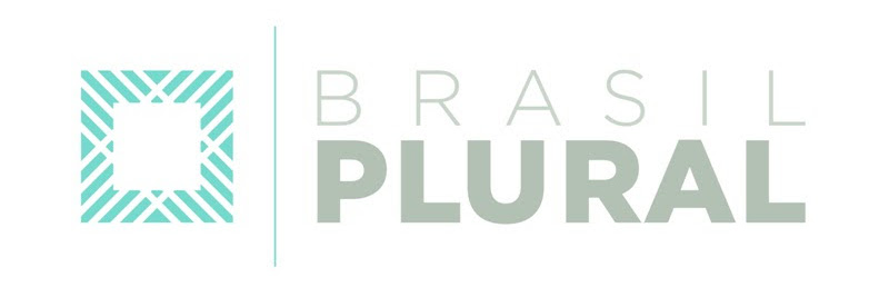 Logo